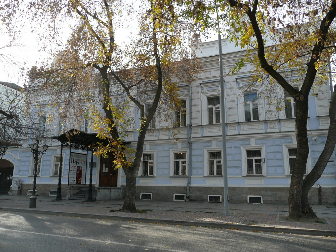 Yekaterinburg Regional Museum